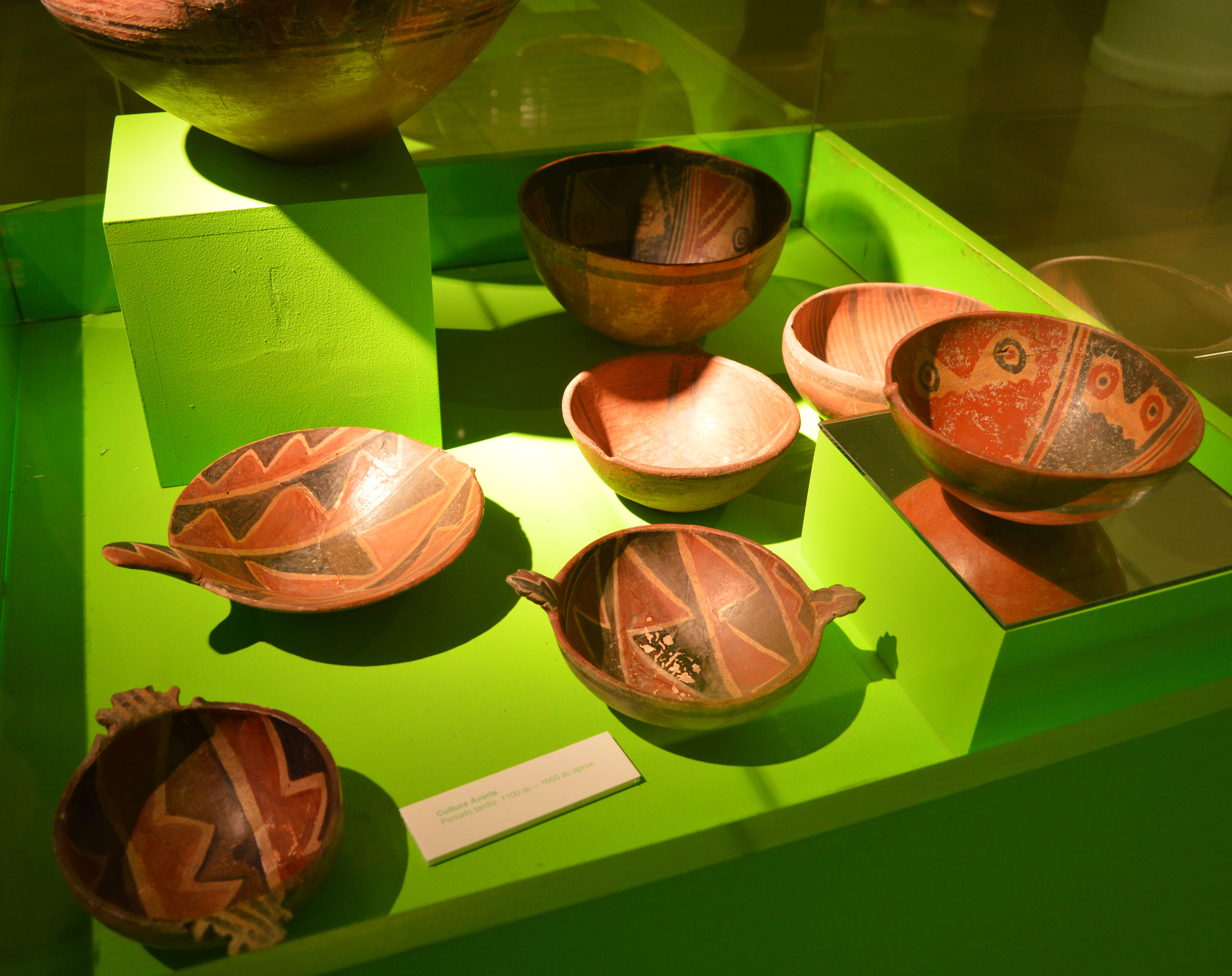 Alfarería indígena.